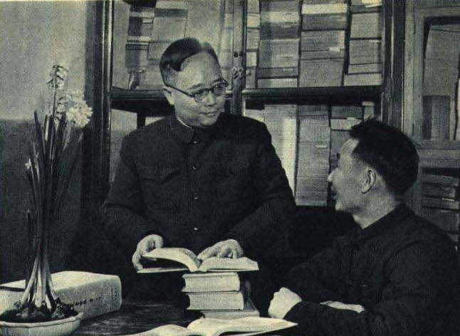 1962-05 1962年 何其芳（左）